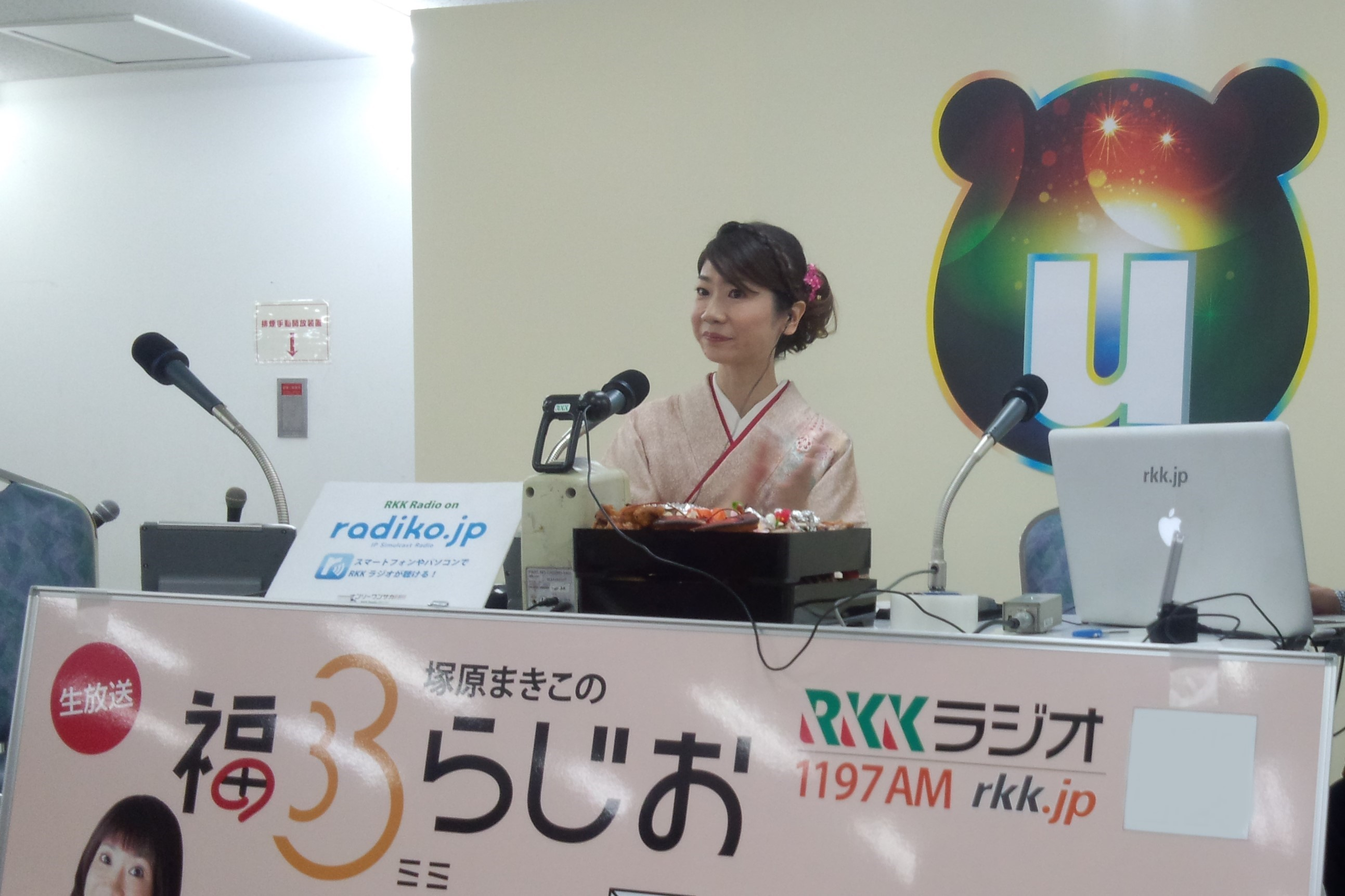 塚原まきこ 2013年元日、「塚原まきこの福ミミらじお」の公開生放送が行われた熊本市の「県民百貨店」にて